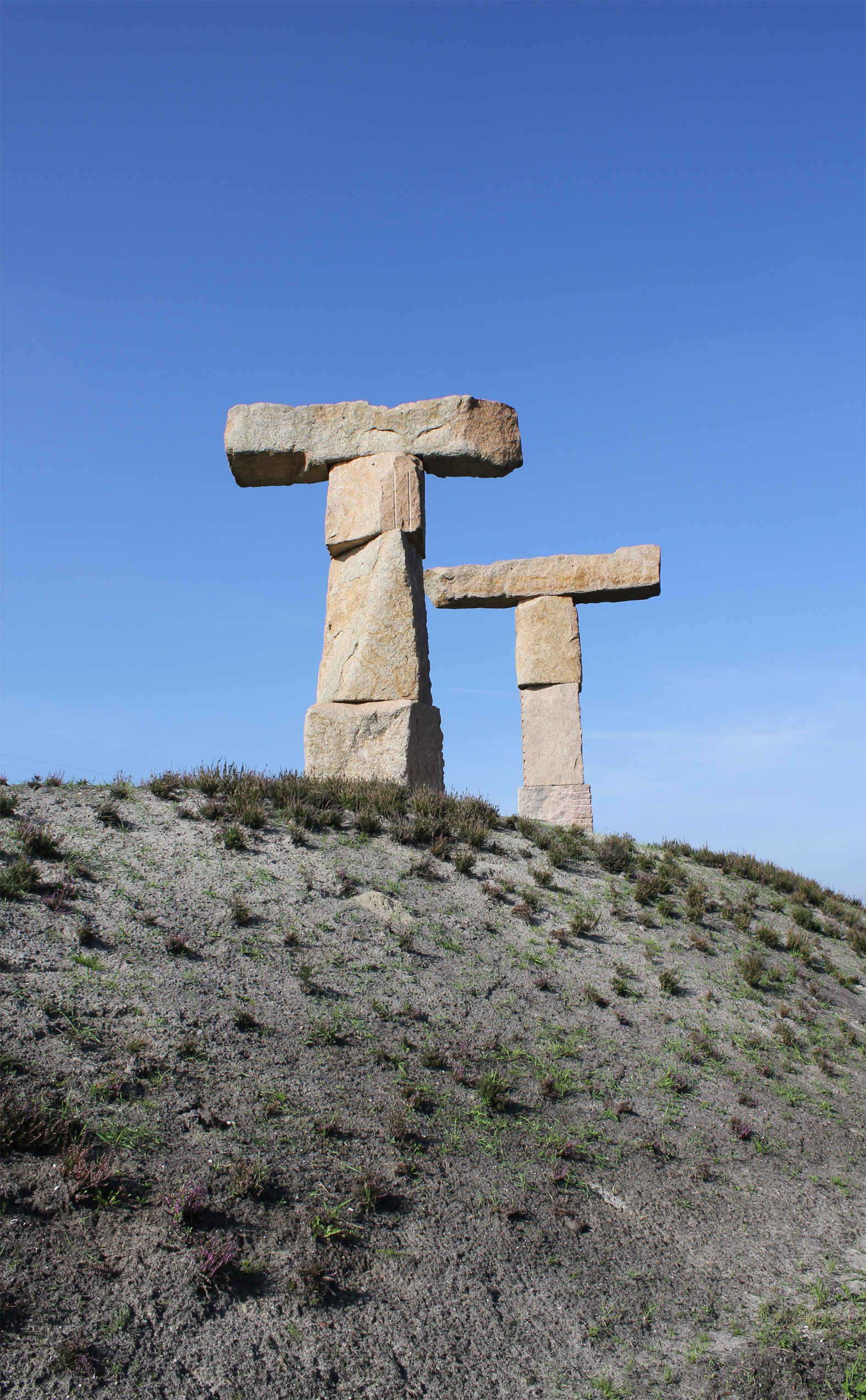 TT landmark aan deA28 bij Assen zuid